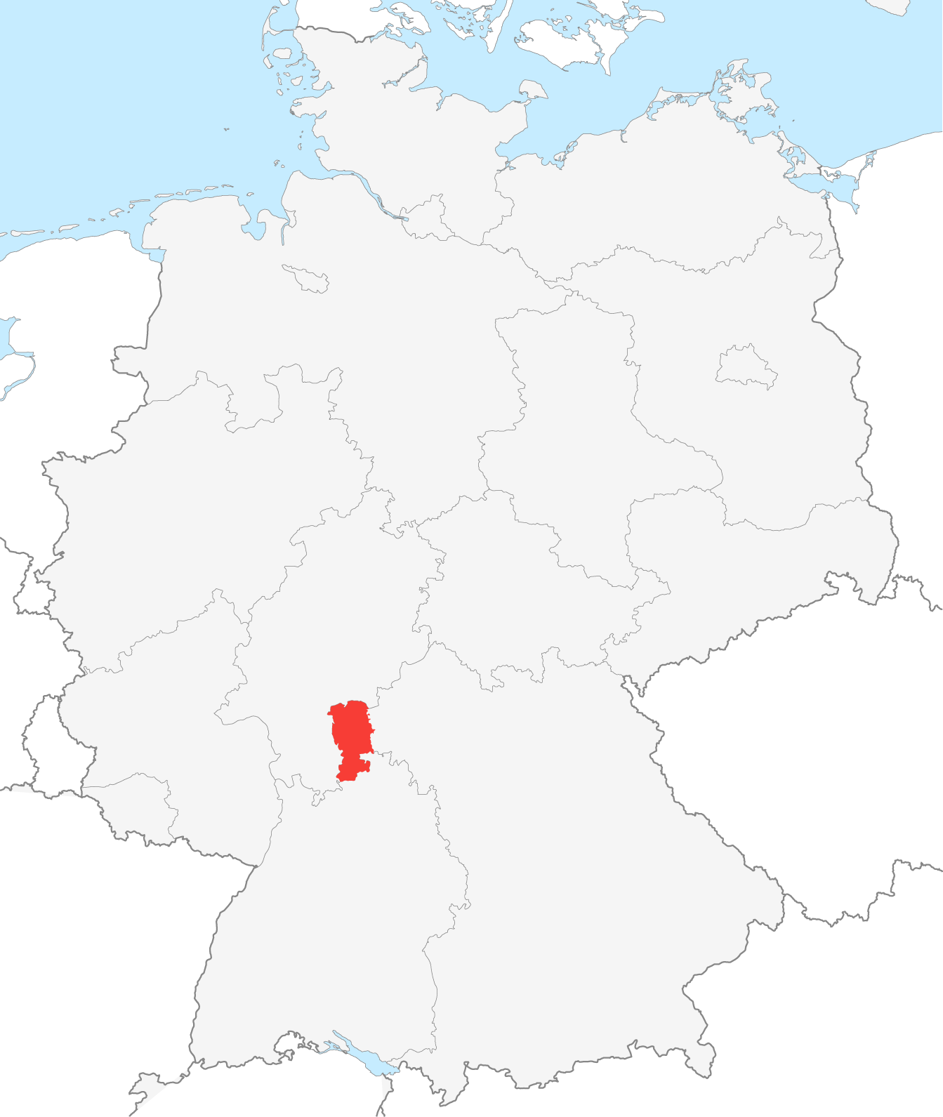 Lage der bayrischen Region Untermain in Deutschland